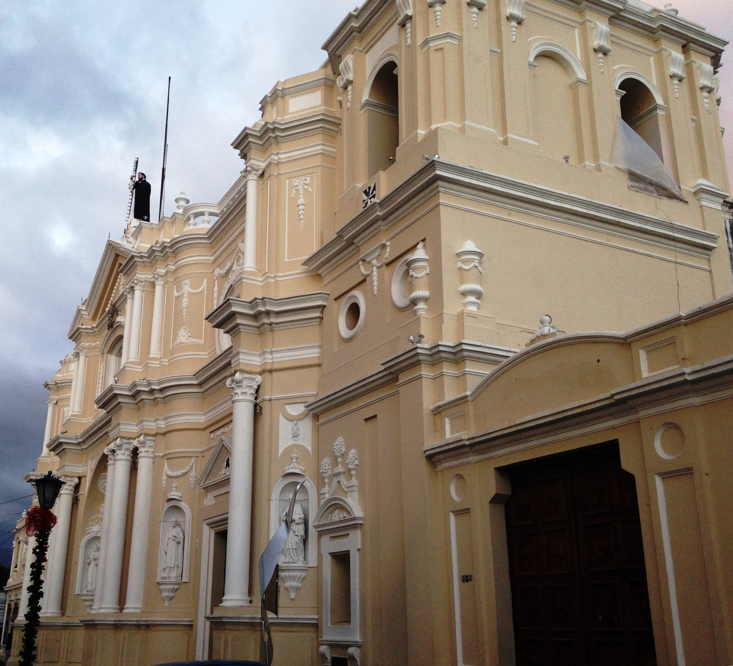 Fachada de la iglesia de Santo Domingo en la Ciudad de Guatemala en diciembre de 2015.